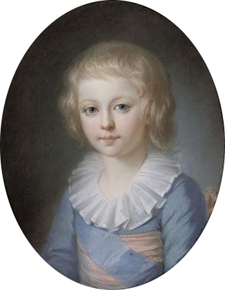 Louis-François-Joseph-Xavier, Dauphin de France, (premier dauphin, fils de Louis XVI) (1781-1789)Ecole Française 18ème siècle